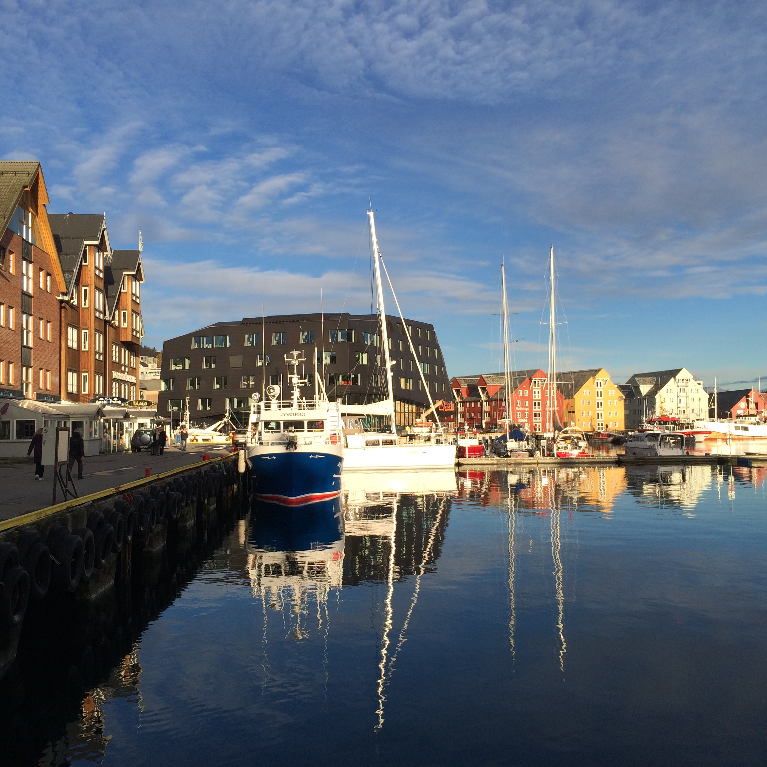 Norges Råfisklag holder til i Kystens Hus i Tromsø sentrum.